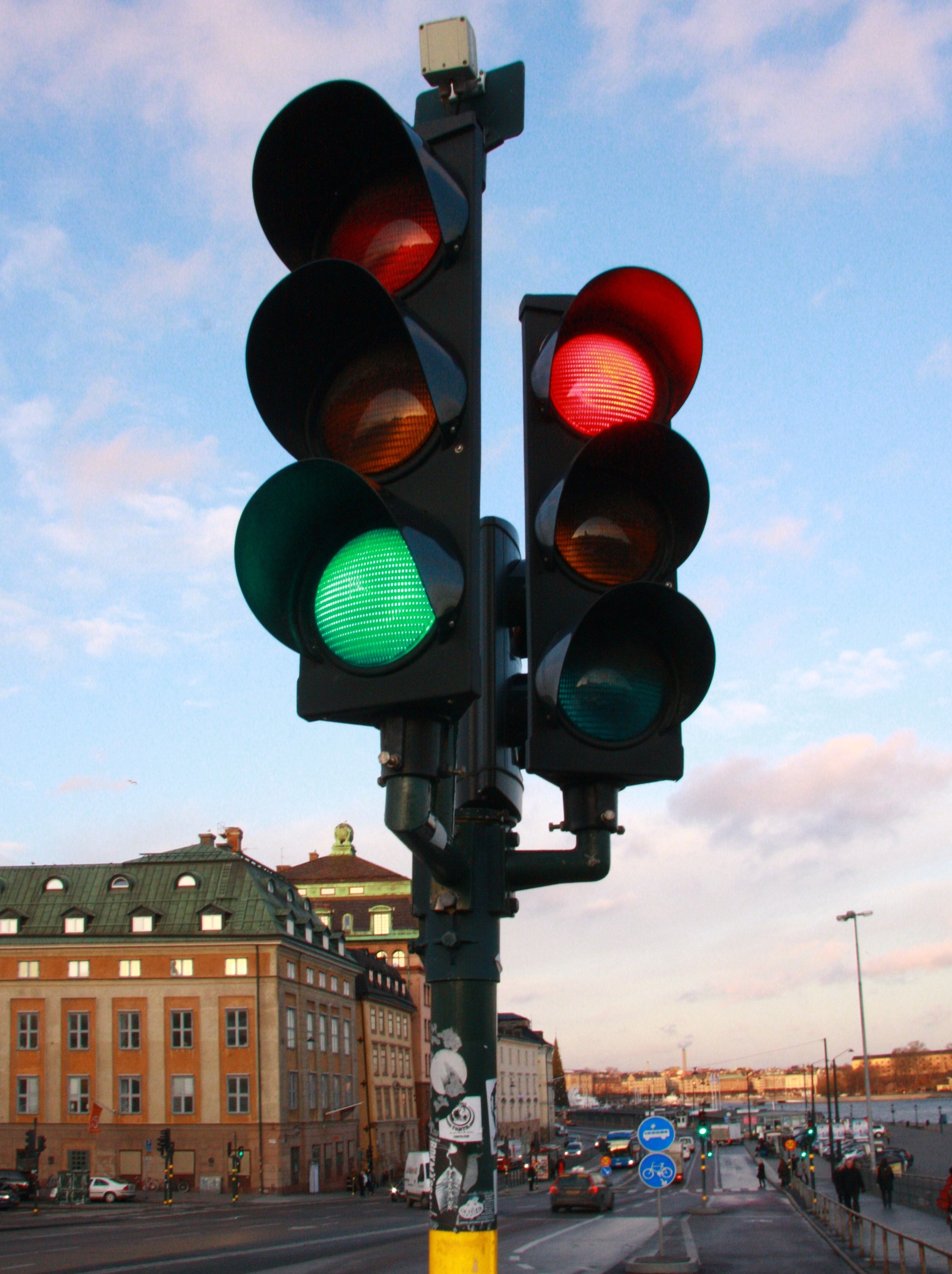 Dubbla trafiksignaler för två körfält som går ihop och fortsätter ned mot Skeppsbron. Fotograferad av mig, Markmc, den 14 december 2011.